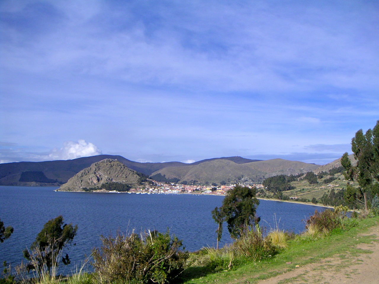 Copacabana